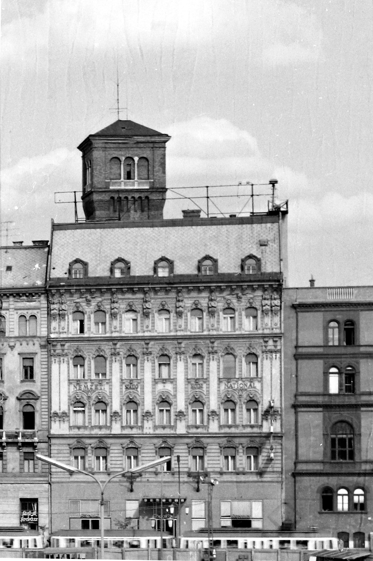 A Nemzeti Szálló 1965-ben, mögötte a hajdani Népszínház víztornya